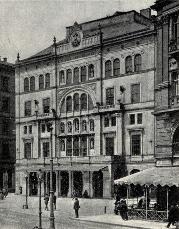 Das Carltheater in Wien um das Jahr 1900